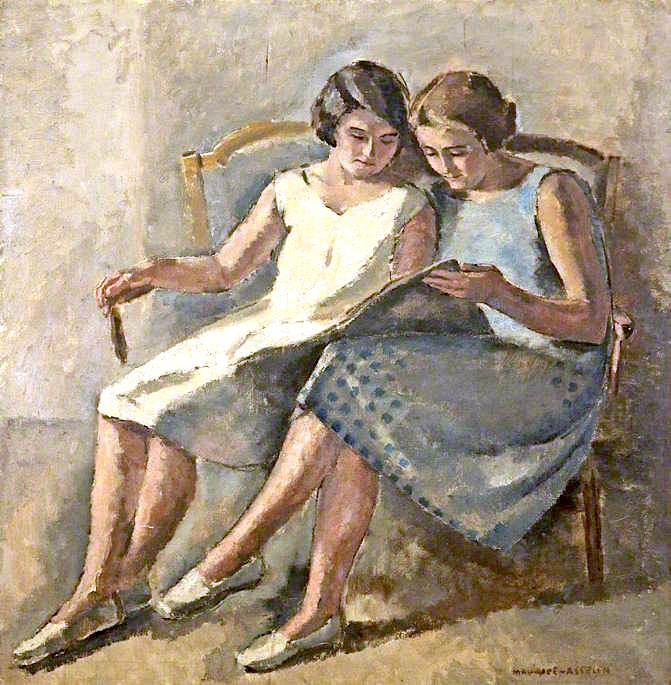 Deux filles lisent